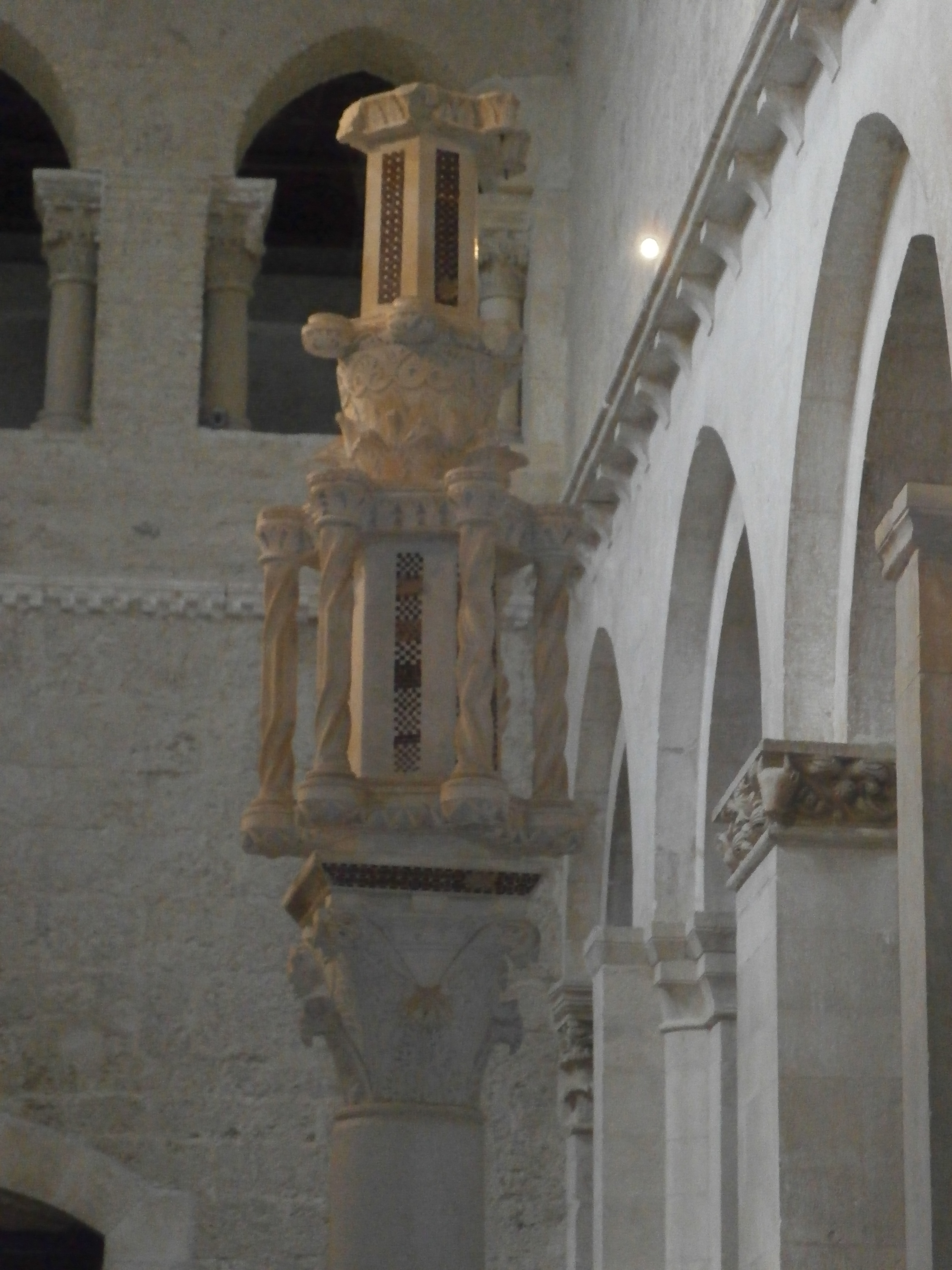 Abbazia di San Clemente a Casauria